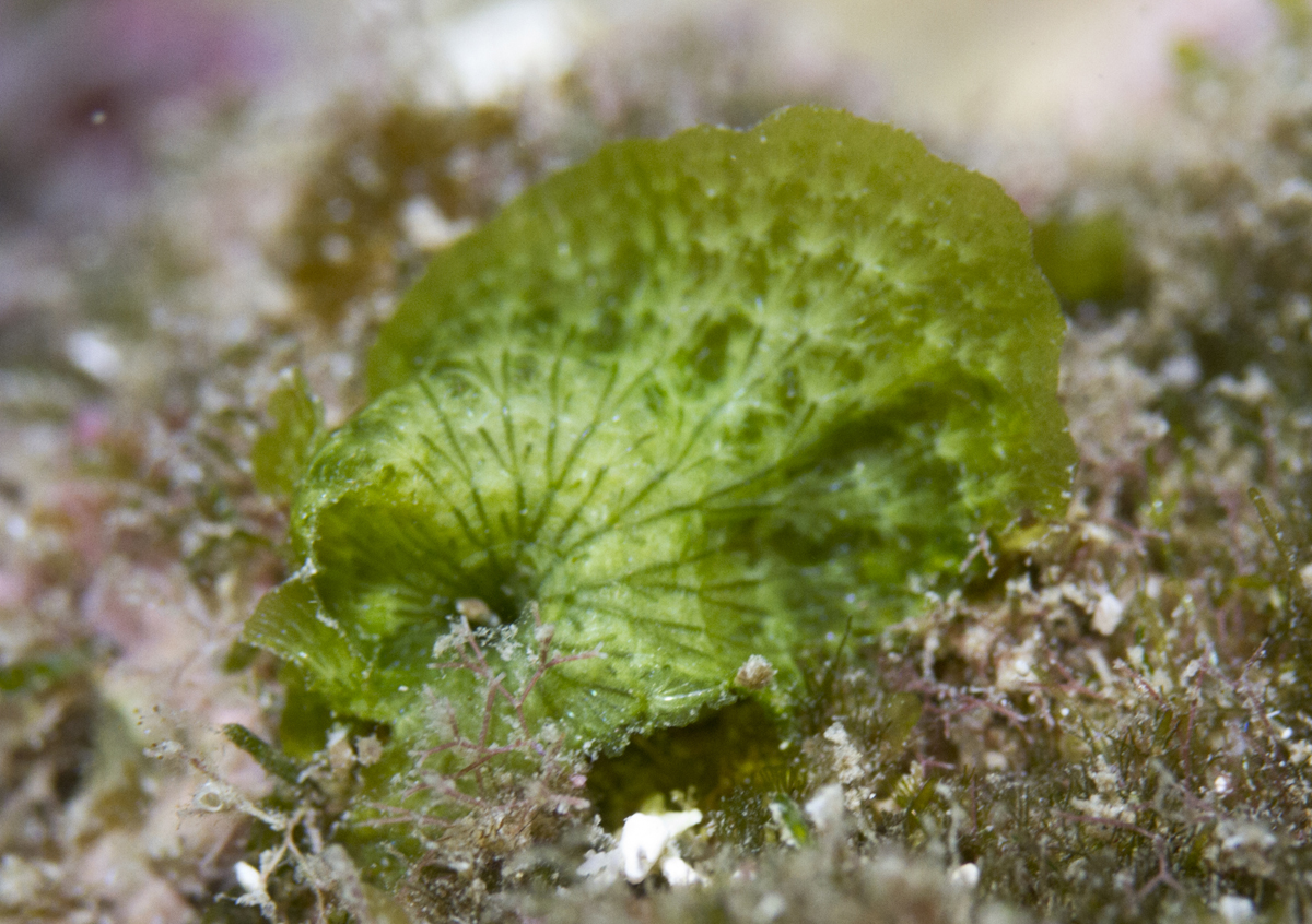 Une algue Anadyomene wrightii à la Réunion.